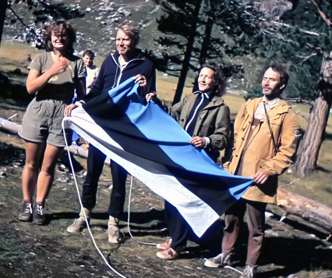 Mägituriaadi korraldajad Lääne-Kaukasusel 1991. aastal